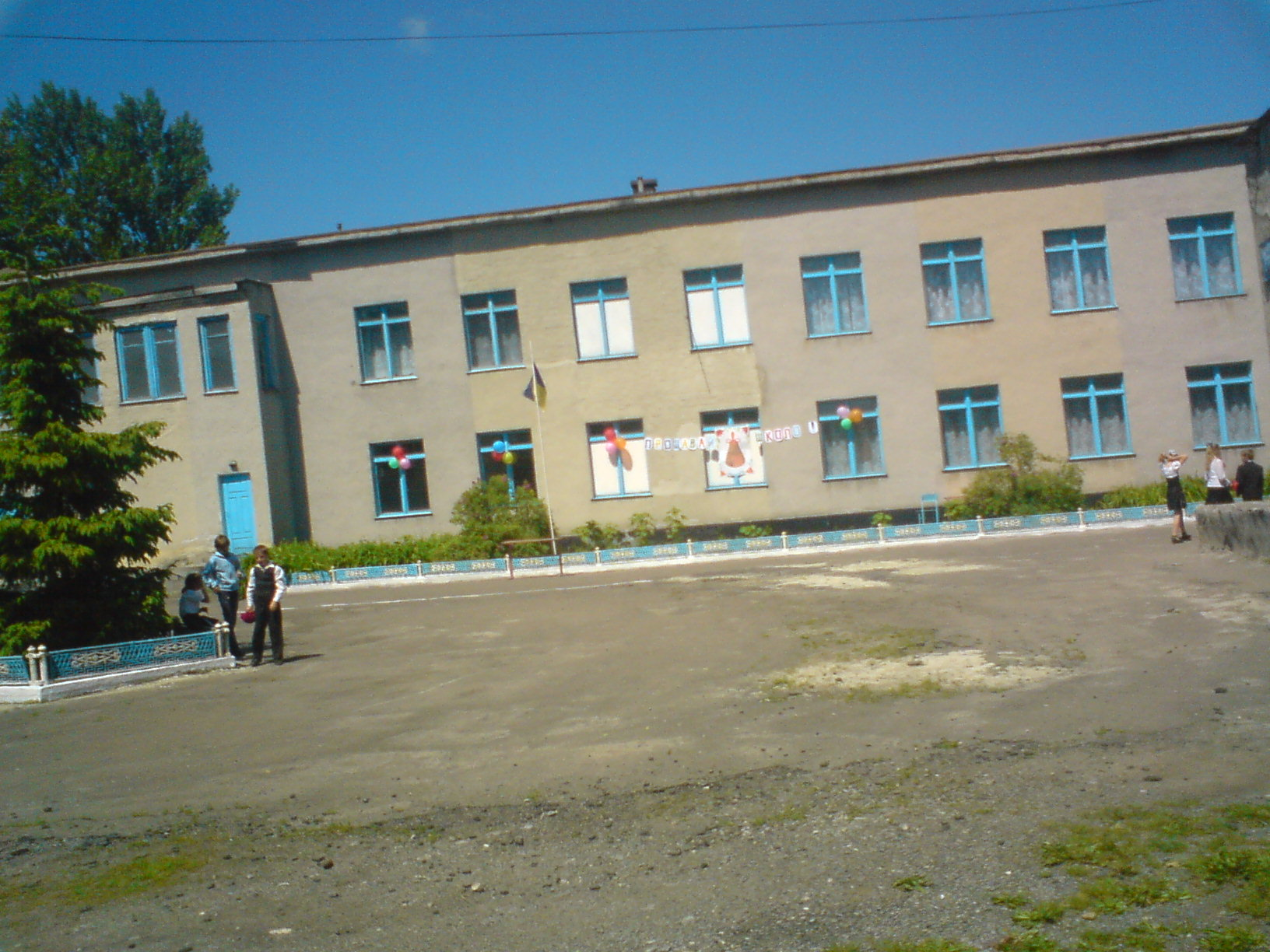 Вишгородоцька середня загальноосвітня школа І-ІІІ ступенів